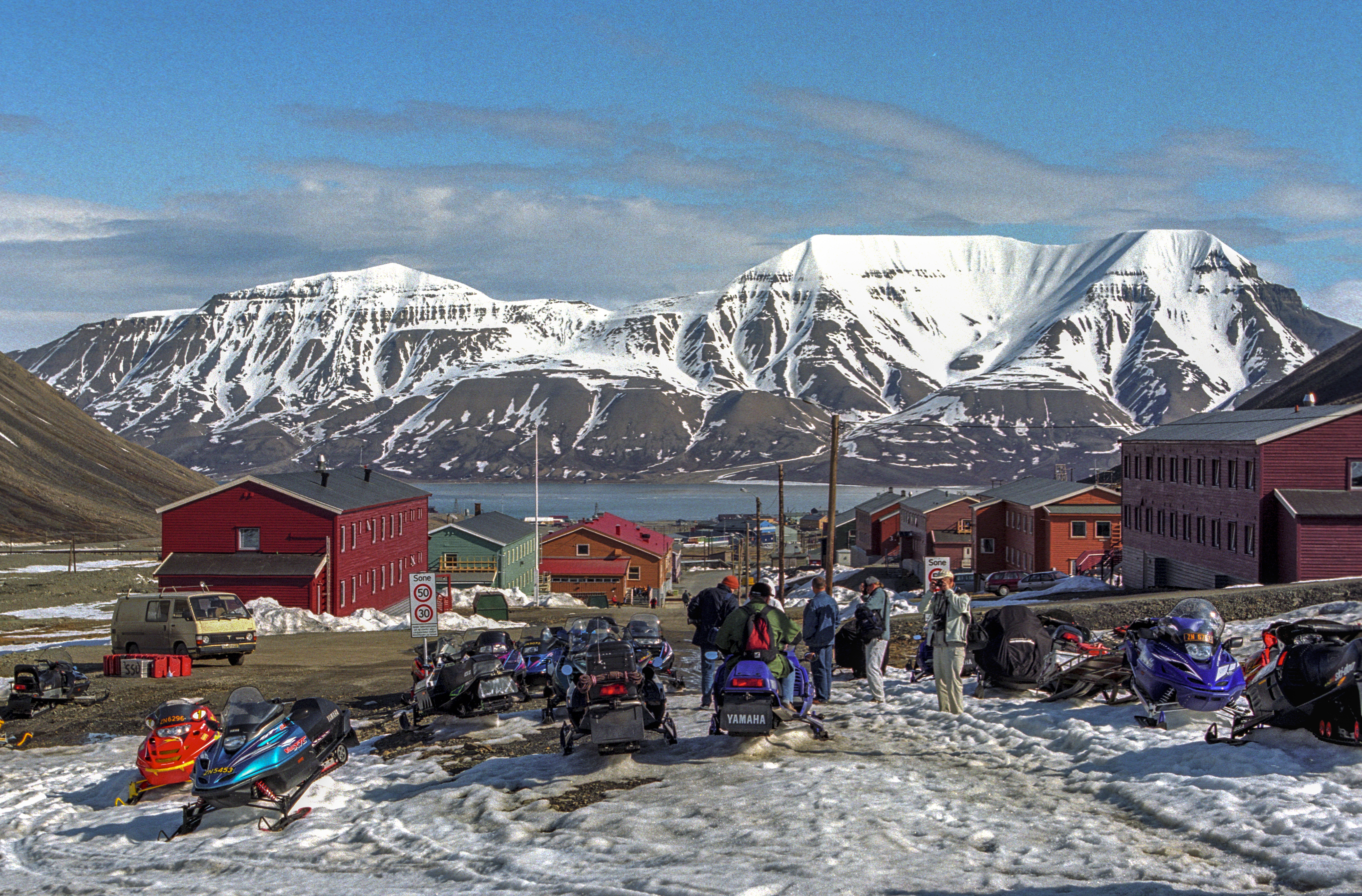 Svalbard, Nybyen in Longyearbyen